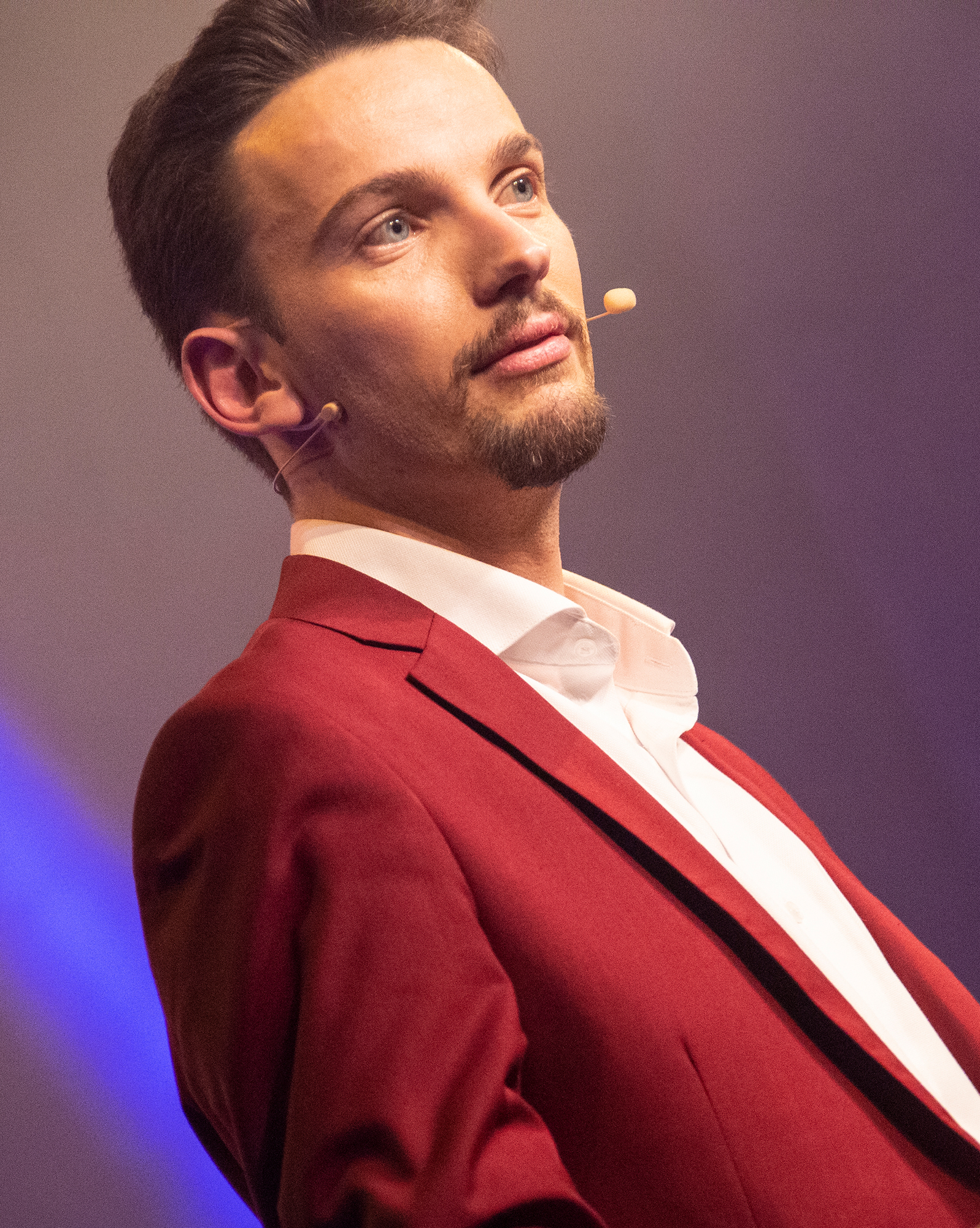 Léo Brière sur scène, dans son spectacle « L'expérience interdite ».